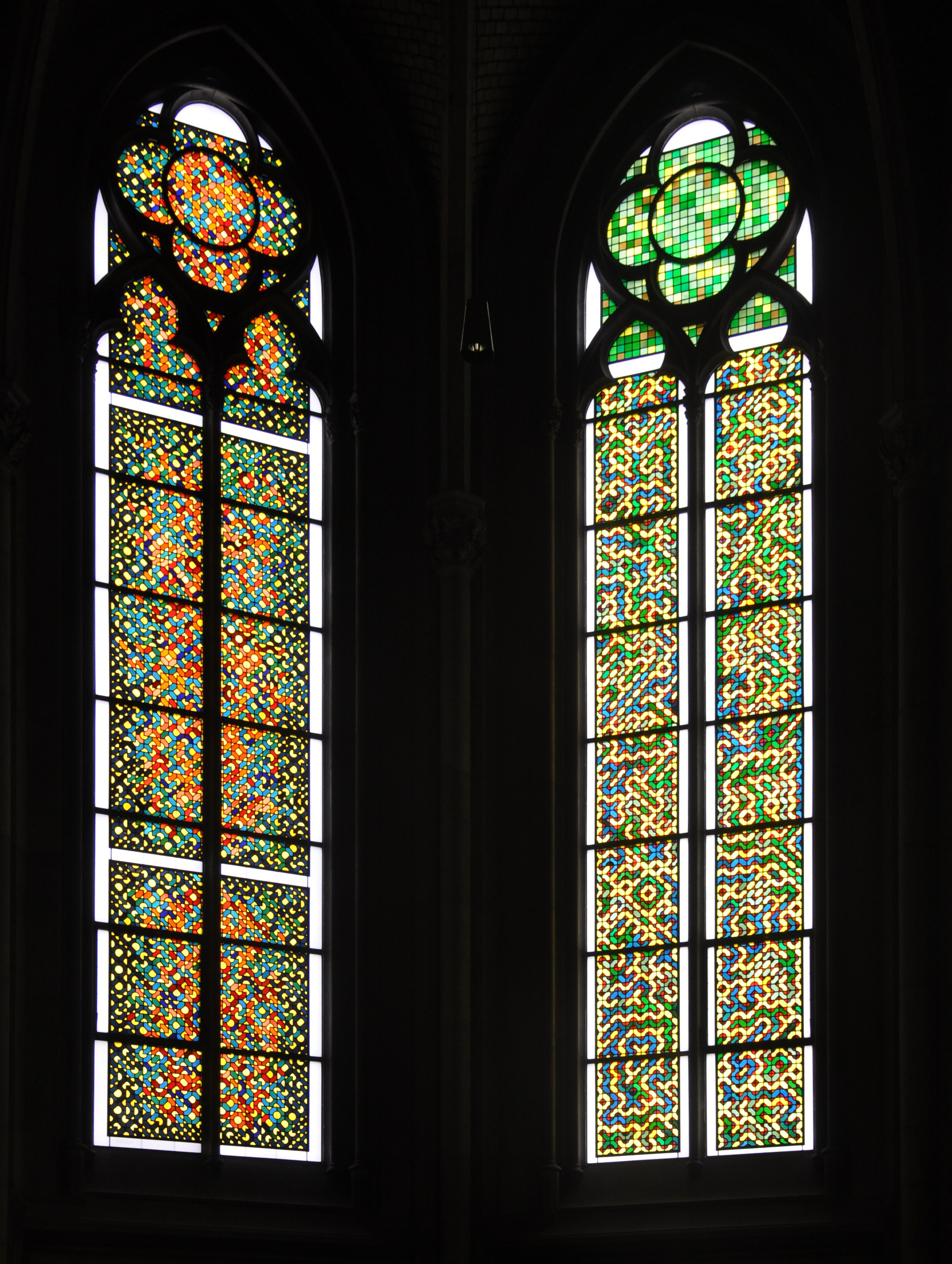 Linz, Neuer Dom, moderne Glasfenster von Karl-Martin Hartmann, ab 1993